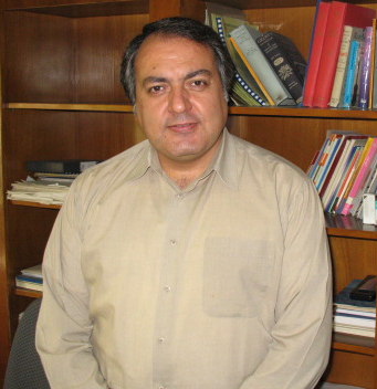 مهرداد دلنوازی - فروردین ۱۳۸۶ - مرکز موسیقی صدا و سیما